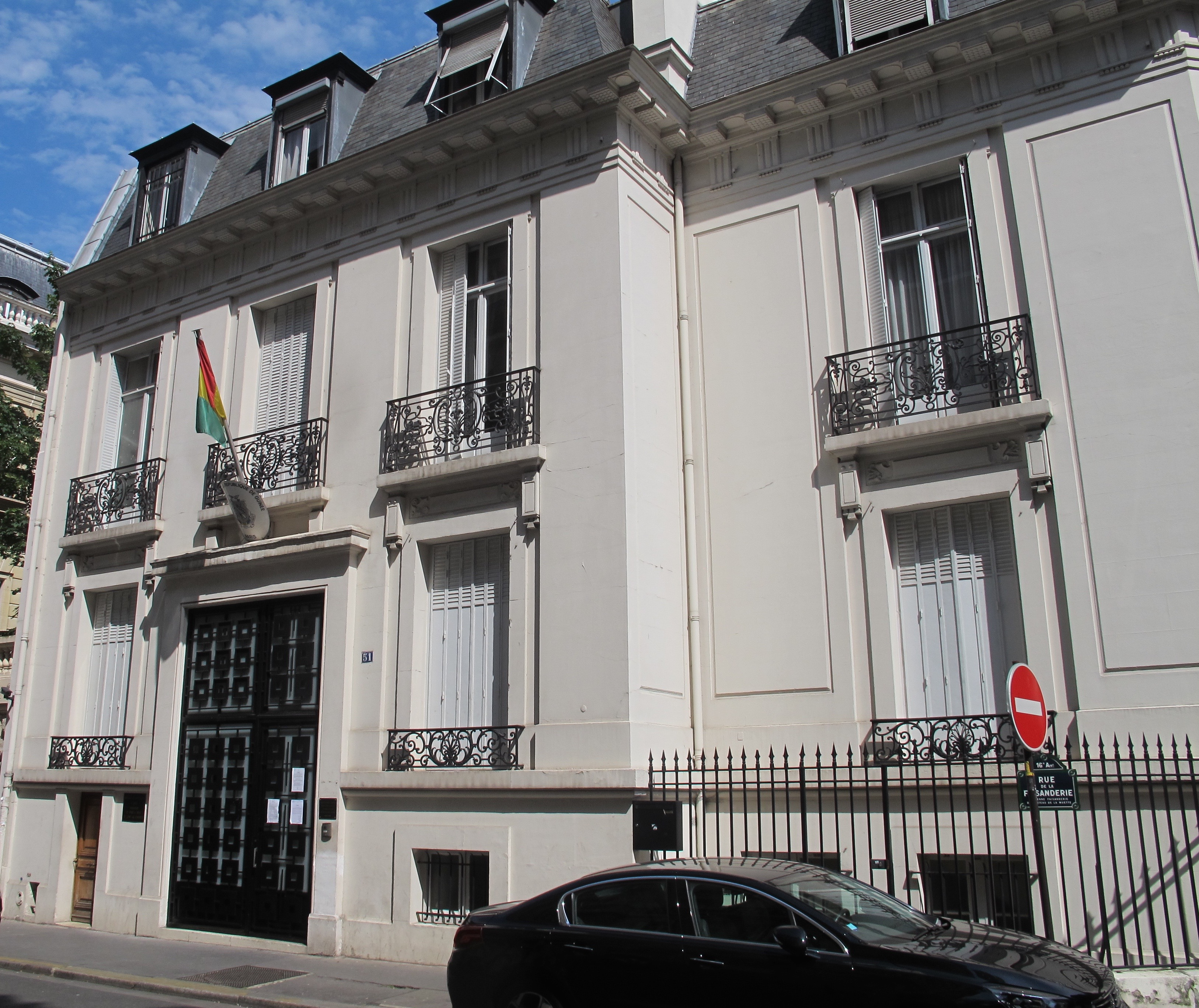 Ambassade de Guinée en France, 51 rue de la Faisanderie (Paris, 16e).